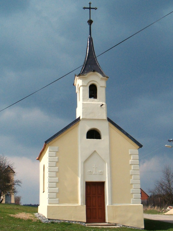 Kaplička Panny Marie ve Václavově